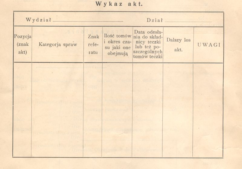 przykładowy strukturalny wykaz akt